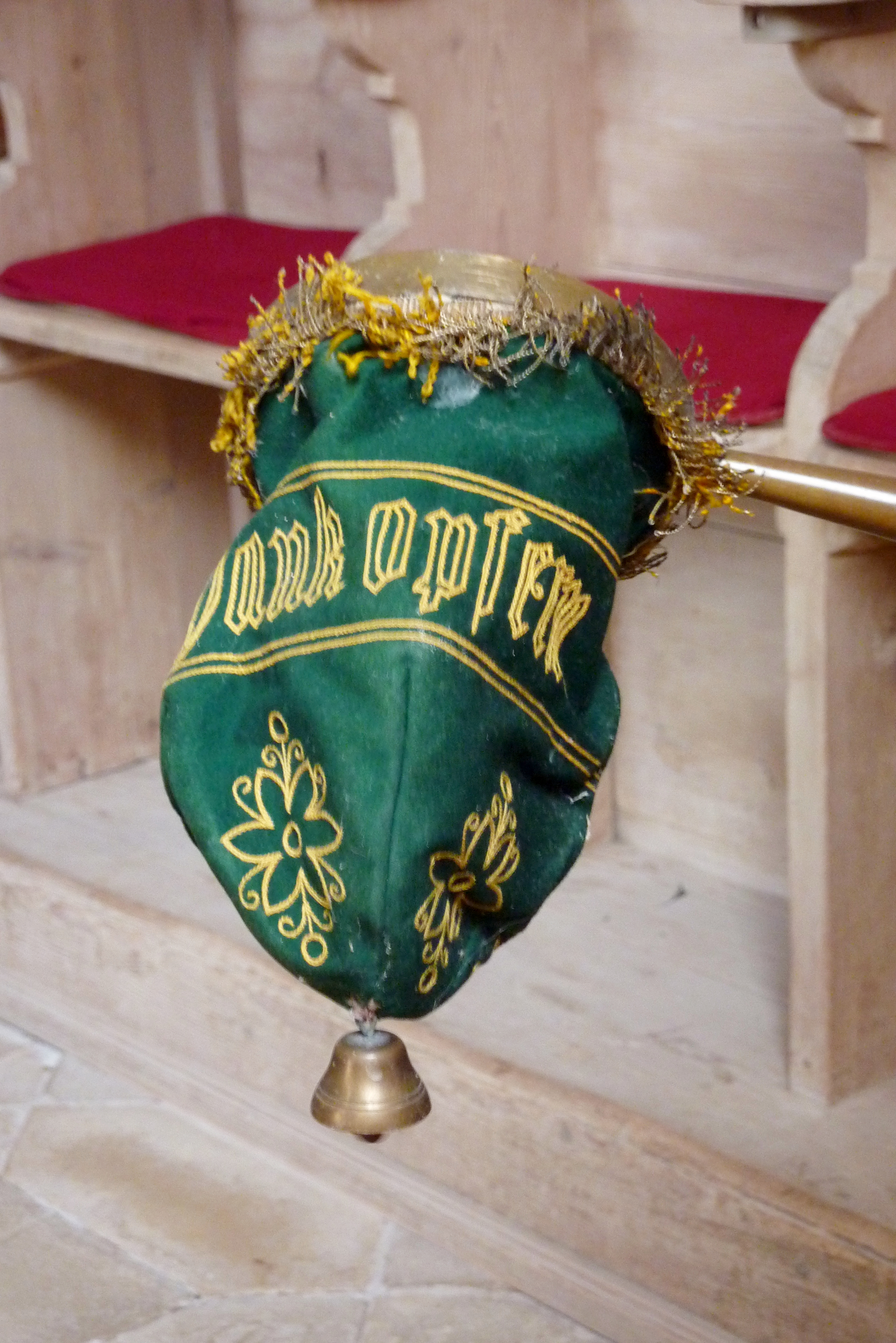 Evangelische Friedhofskirche, ehemals St. Martin, in Obermögersheim, einem Stadtteil von Wassertrüdingen im Landkreis Ansbach (Bayern), Klingelbeutel